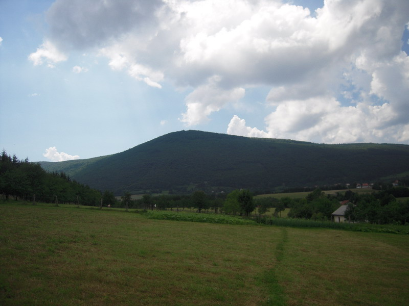 Planina_Čemernica